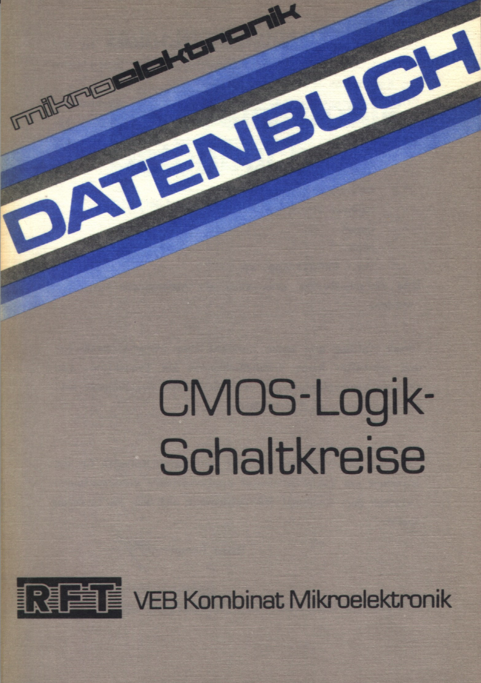 Ein Bauelemente-Datenbuch, 1989 herausgegeben vom AEB